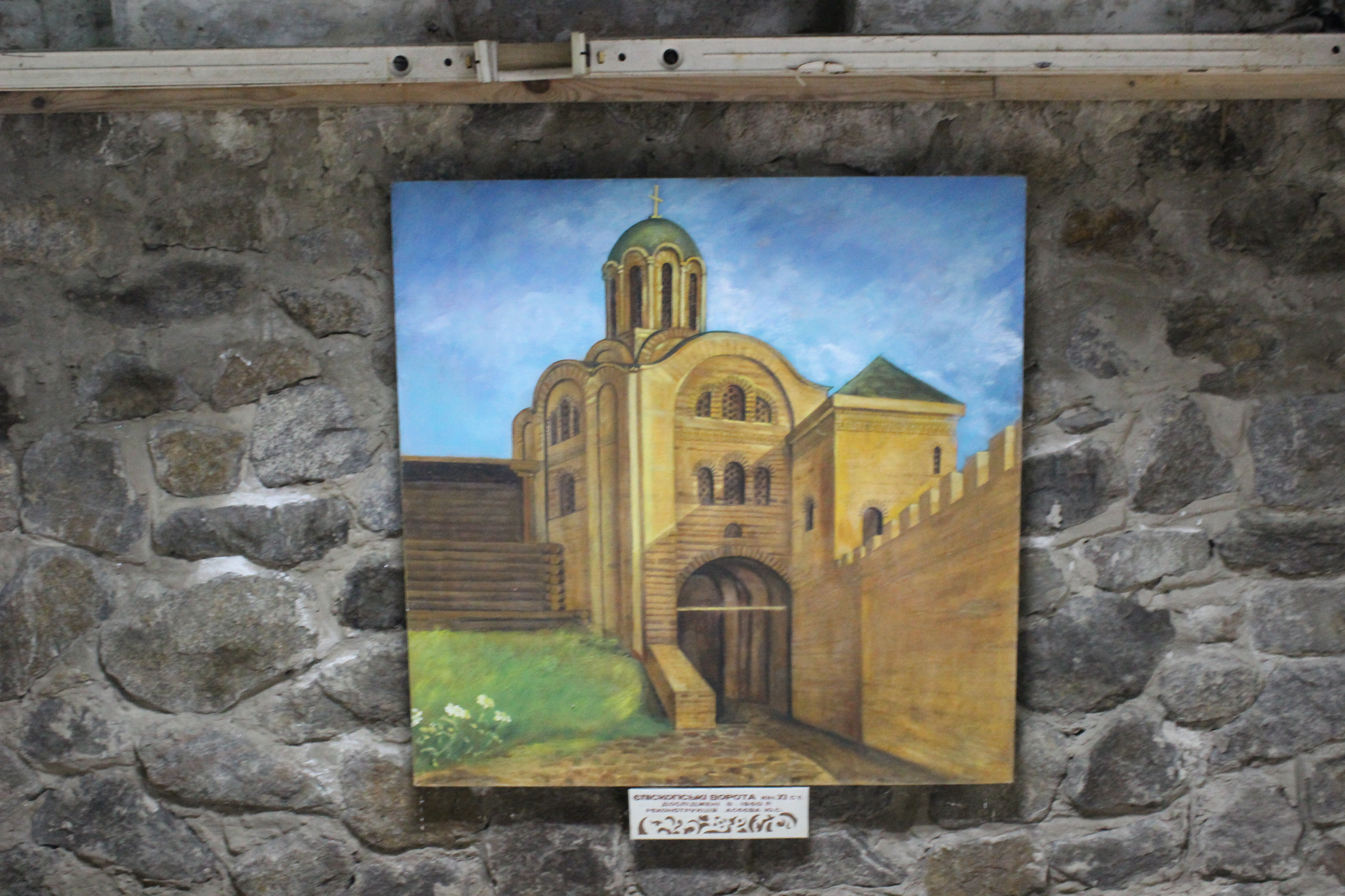 Залишки «Єпископських воріт», Переяслав-Хмельницький, вул. Кріпосна, 27, 27А, 29, 31